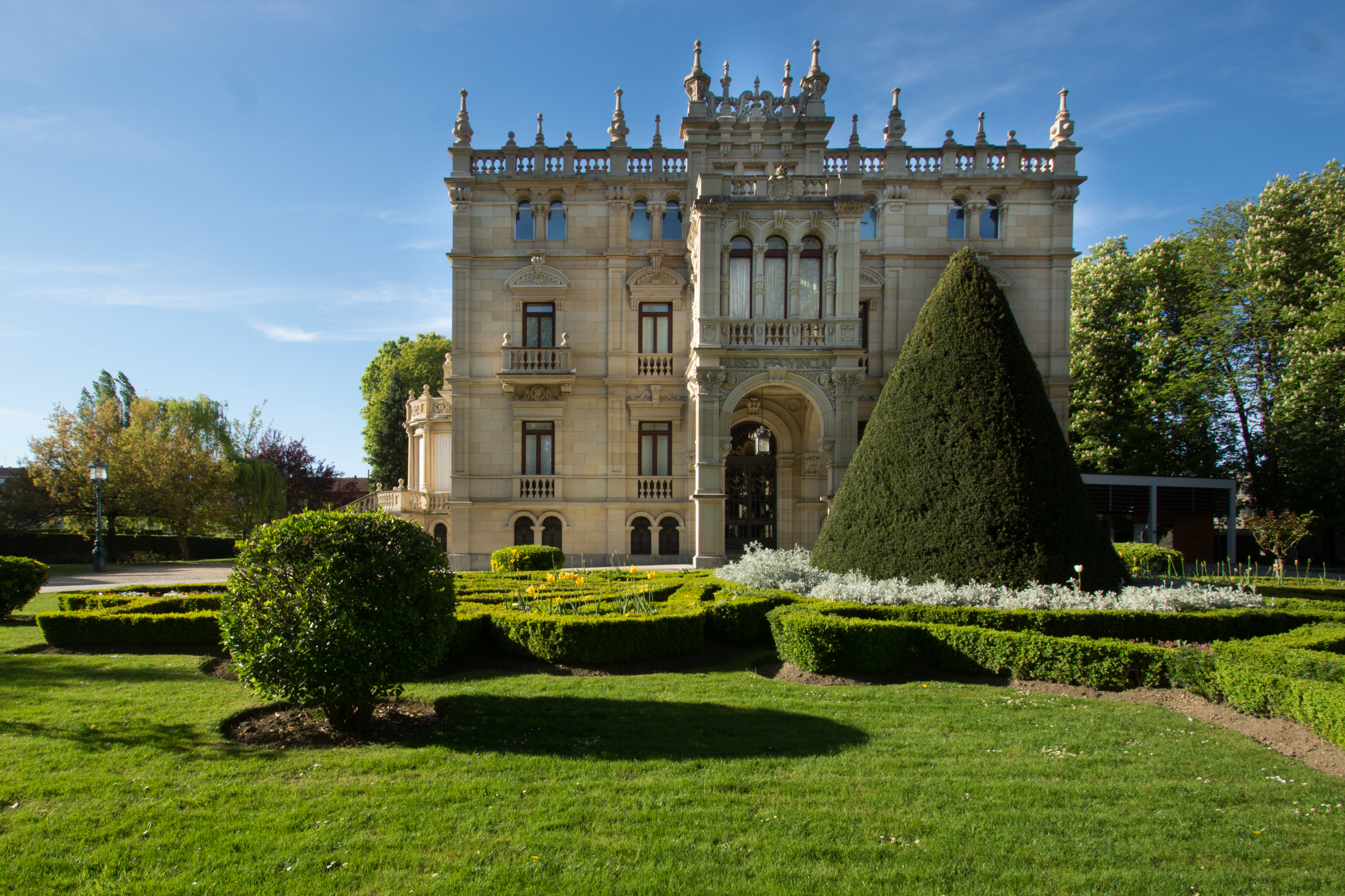 Palacio Agustín de Vitoria